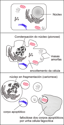 Cambios no núcleo durantre a apoptose.